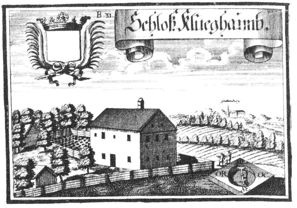 Schloss Klugham nach einer Radierung von Michael Wening von 1721